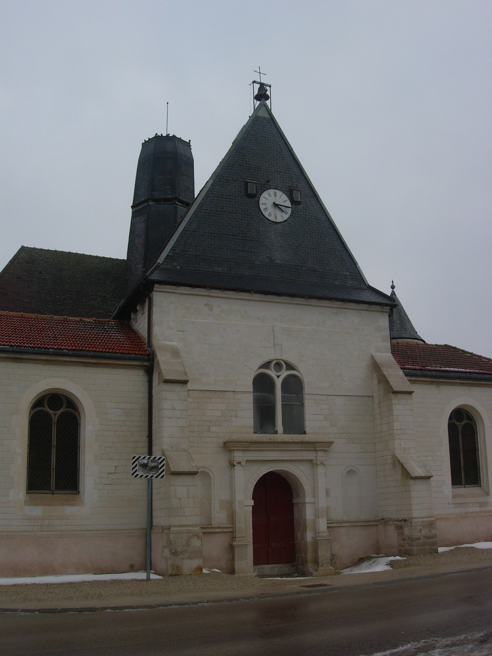 Eglise de Saint-Léger-près-Troyes